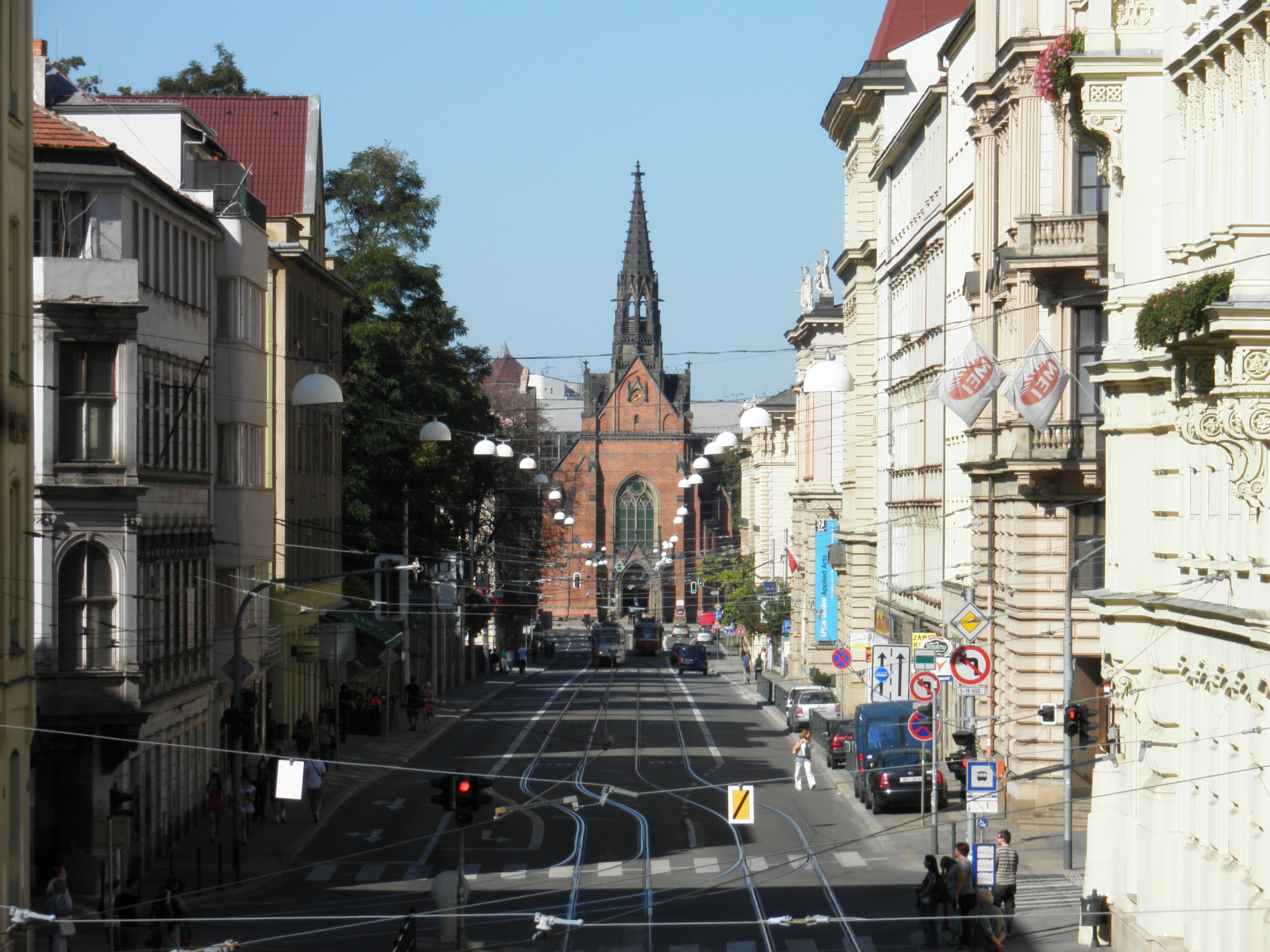 Husova